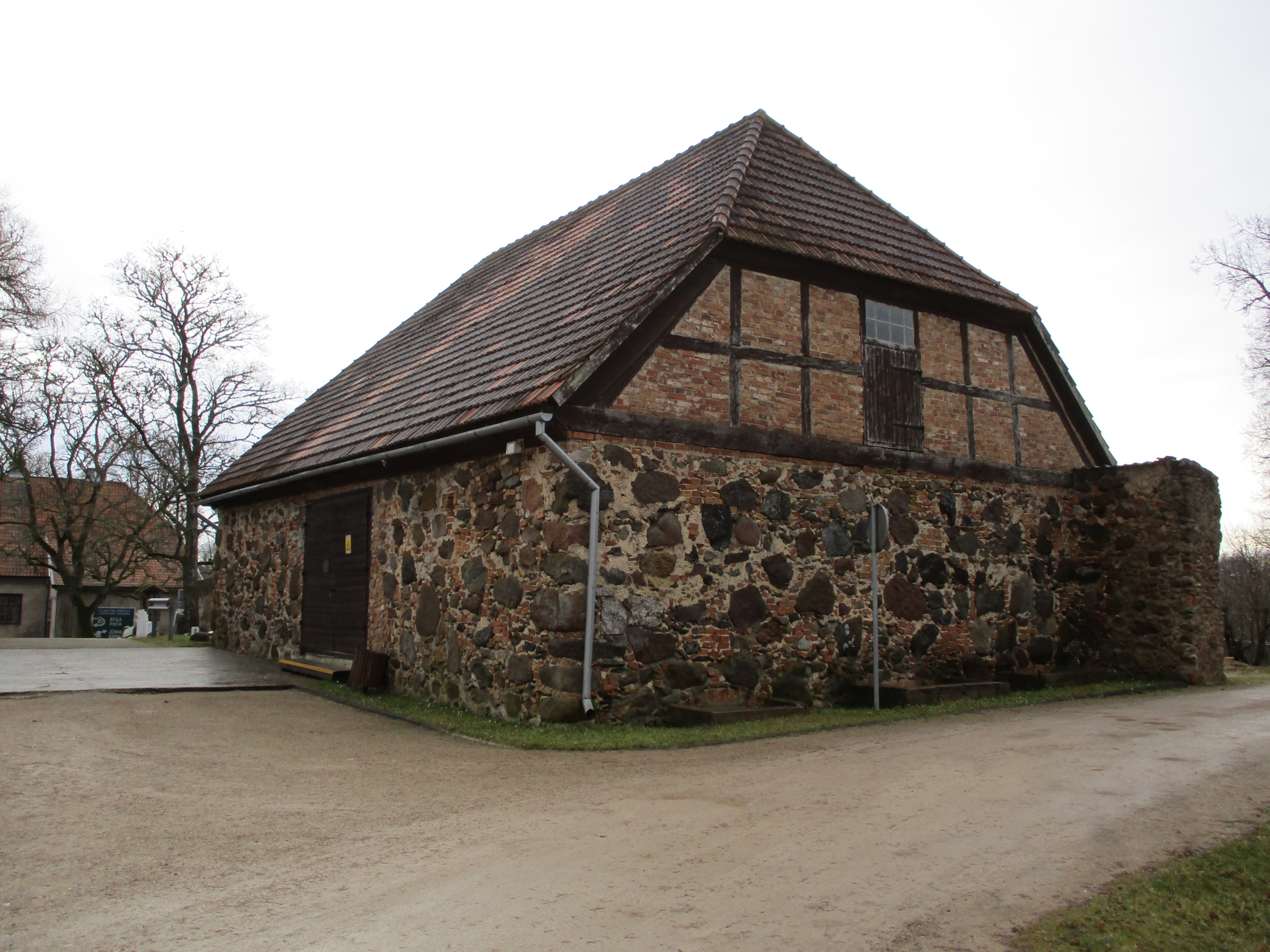 Kastelli läänemüür ja ait. Vaade kirdest.